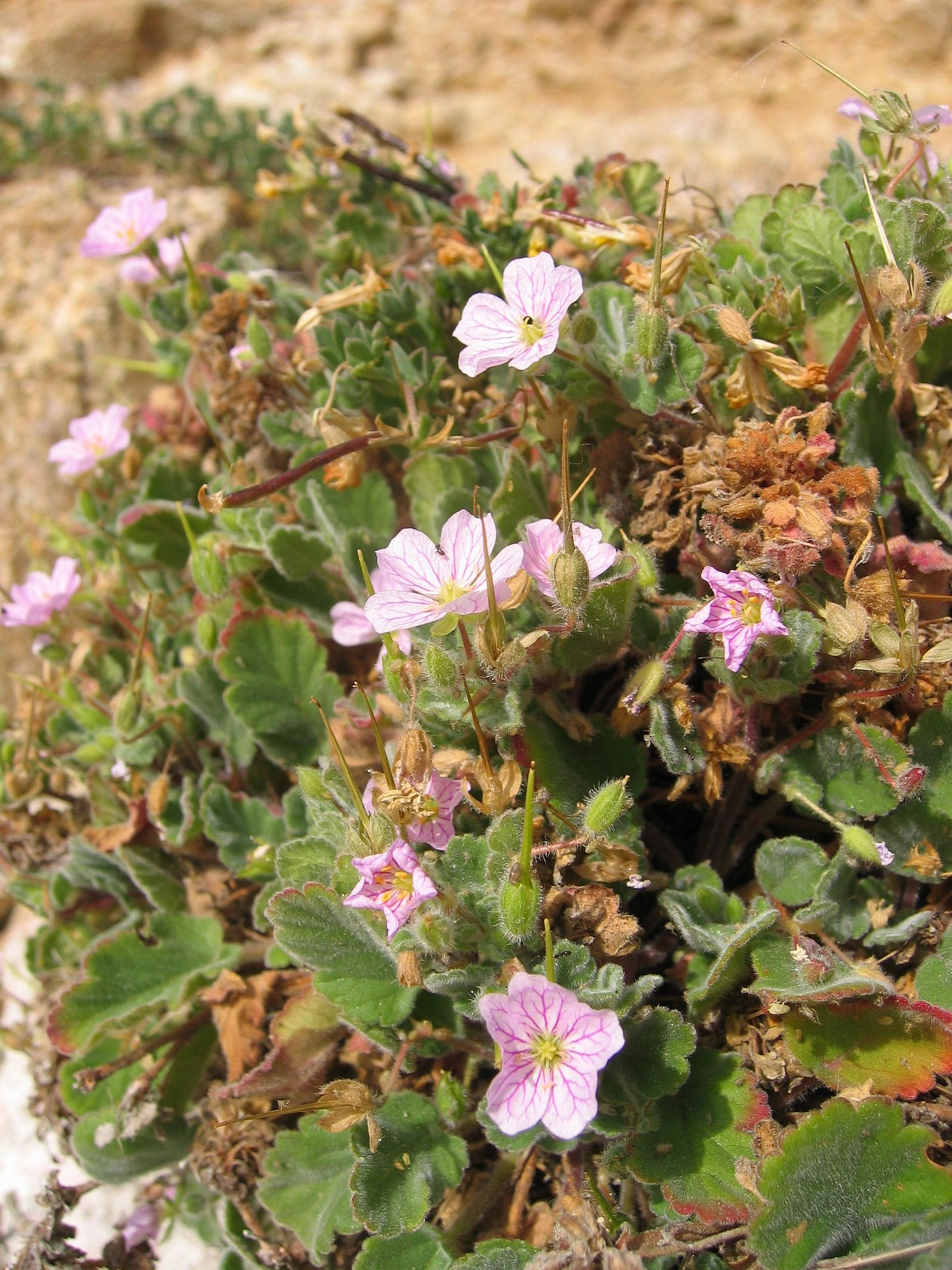 Erodium corsicum La Revellata, Corse, France